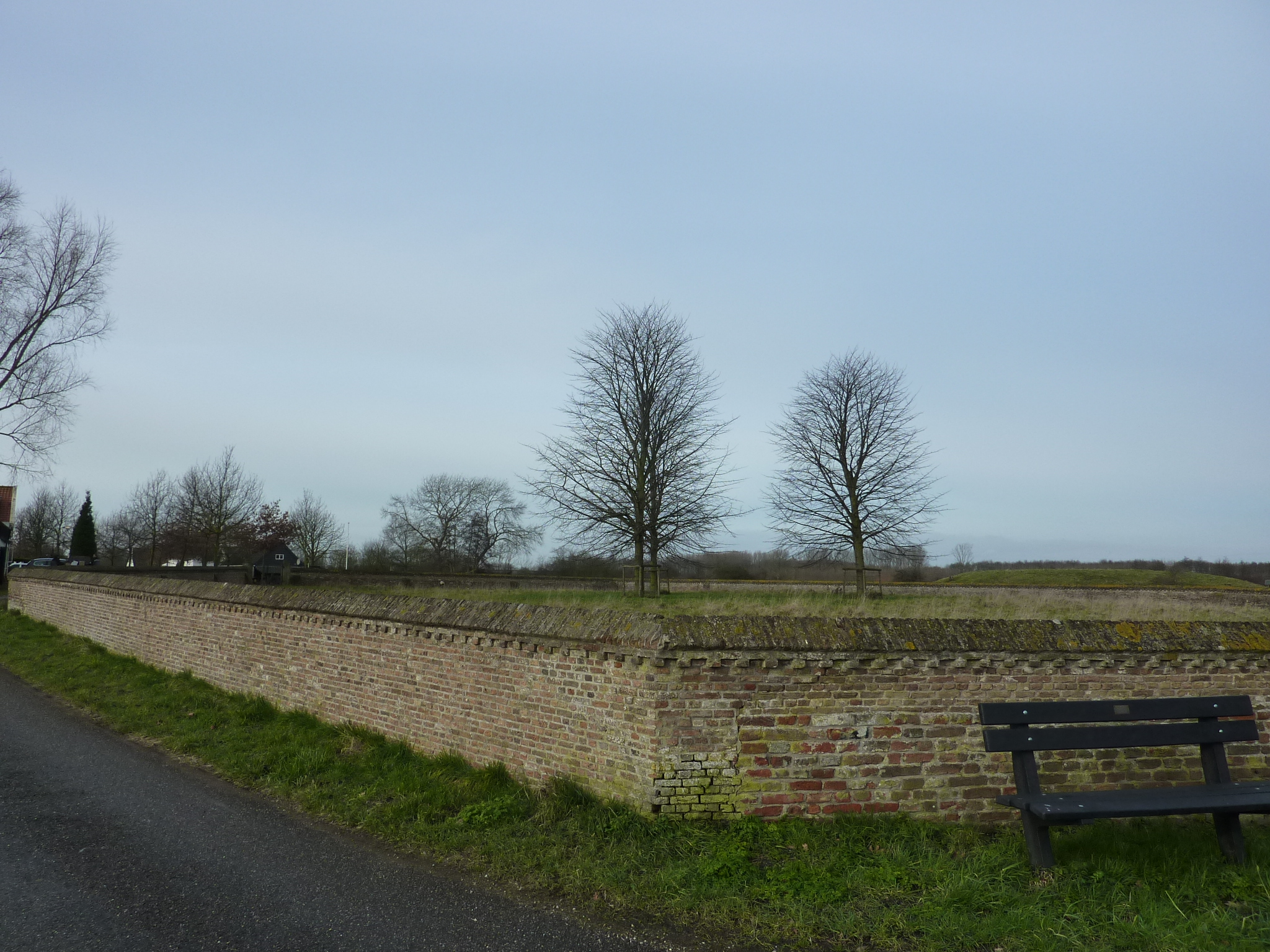 Baarsdorp old church